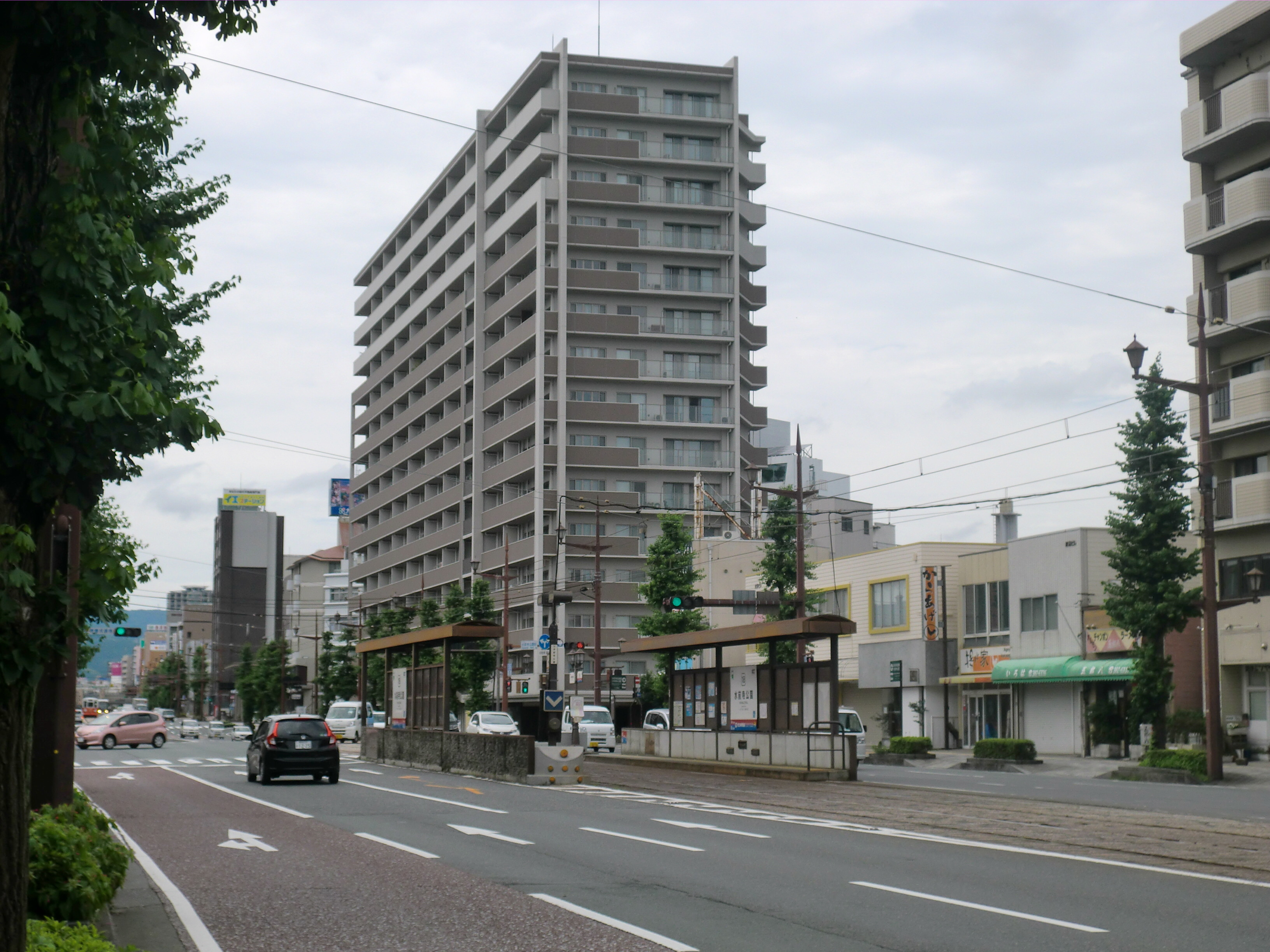 熊本市電水前寺公園前停留場